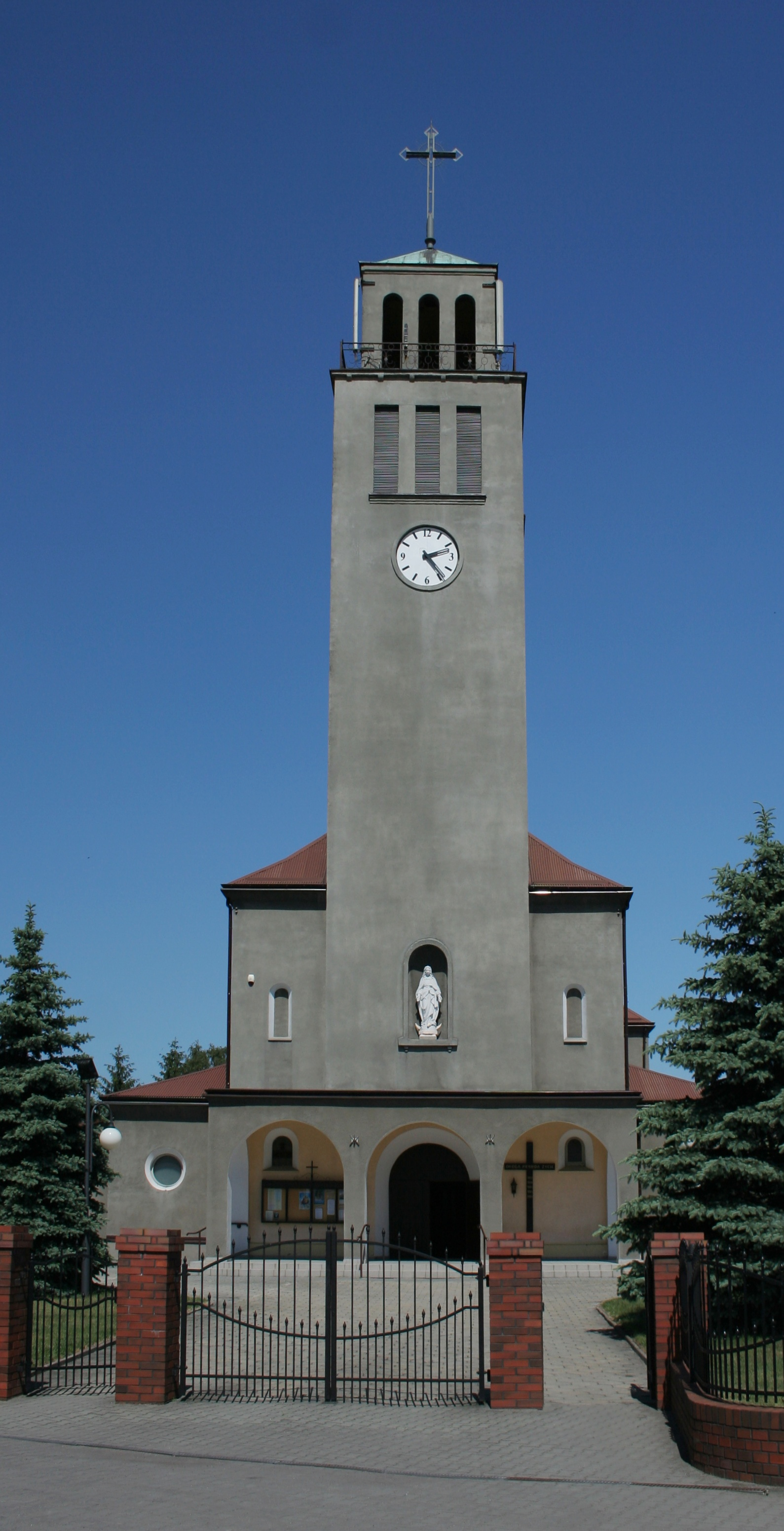 Kościół NMP Królowej Aniołów w Chudowie